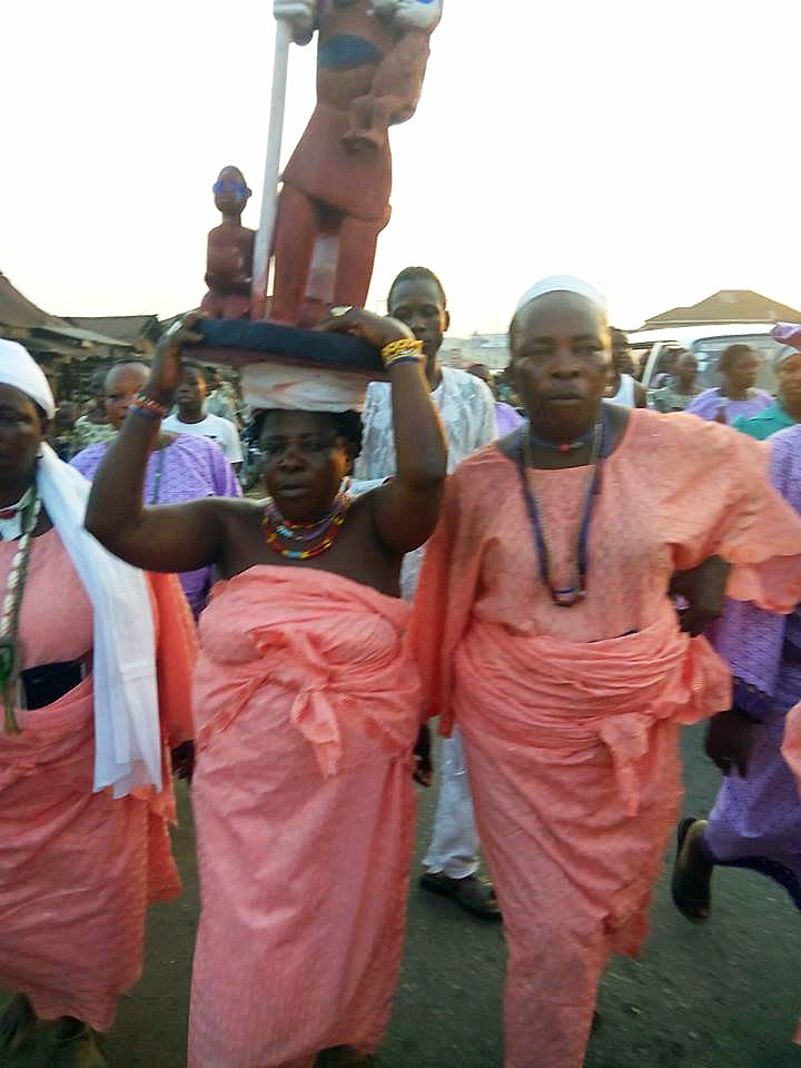 Festival de Yemojá em Ibadan, Oyo, Nigéria